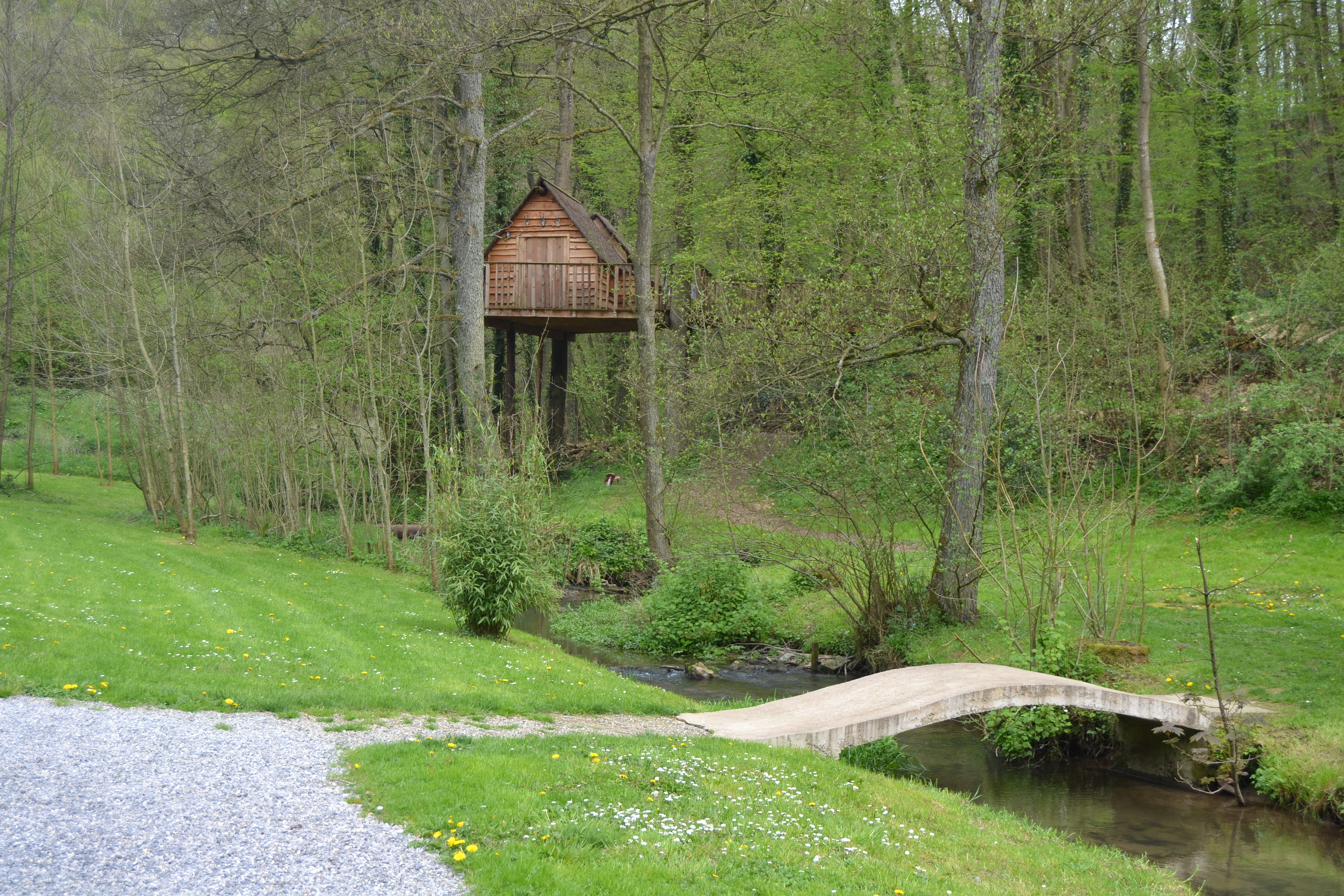 le petit pont enjambant la Leffe